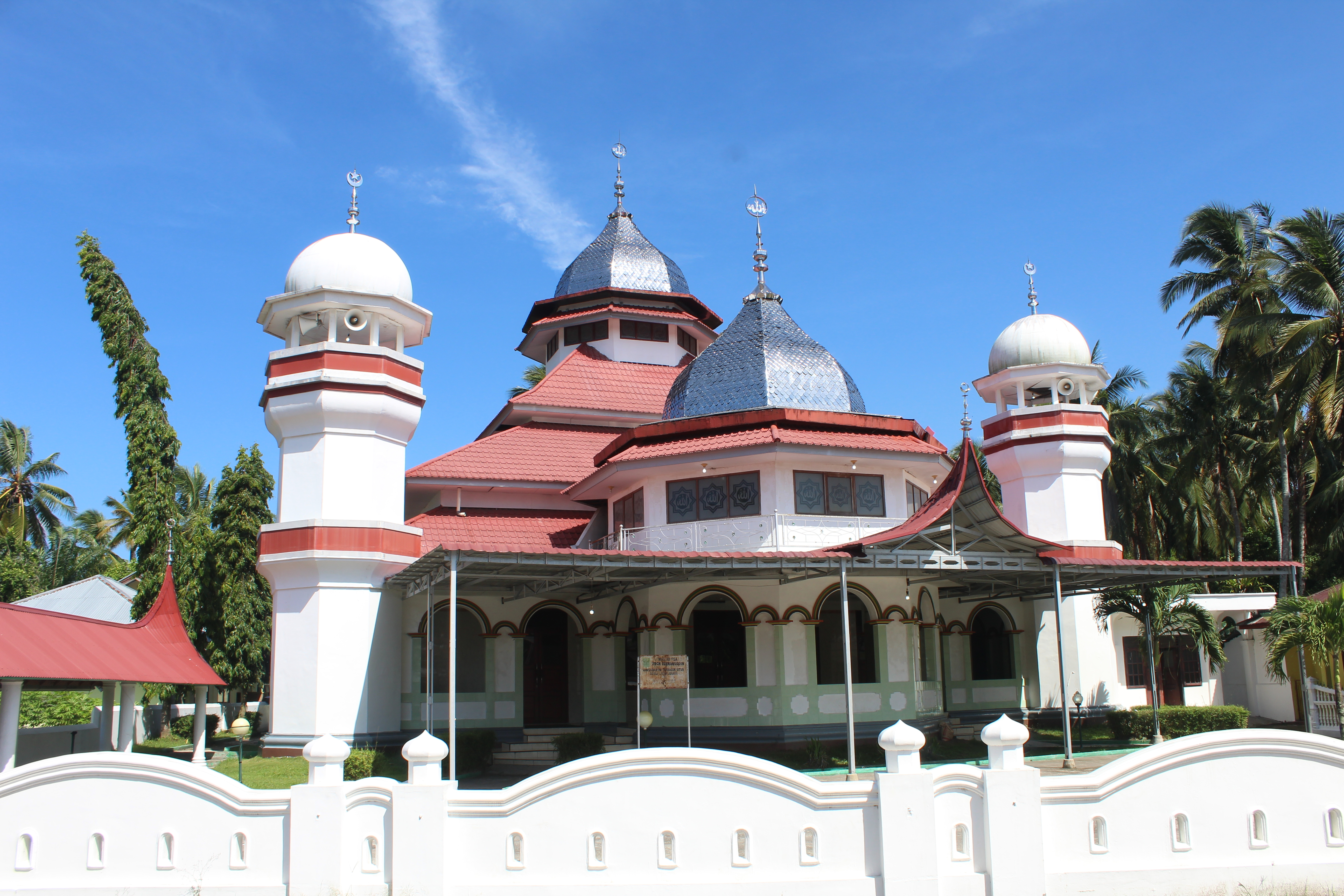 Masjid Raya Syekh Burhanuddin di Nagari Ulakan, Kecamatan Ulakan Tapakis, Kabupaten Padang Pariaman, Sumatra Barat, Indonesia.